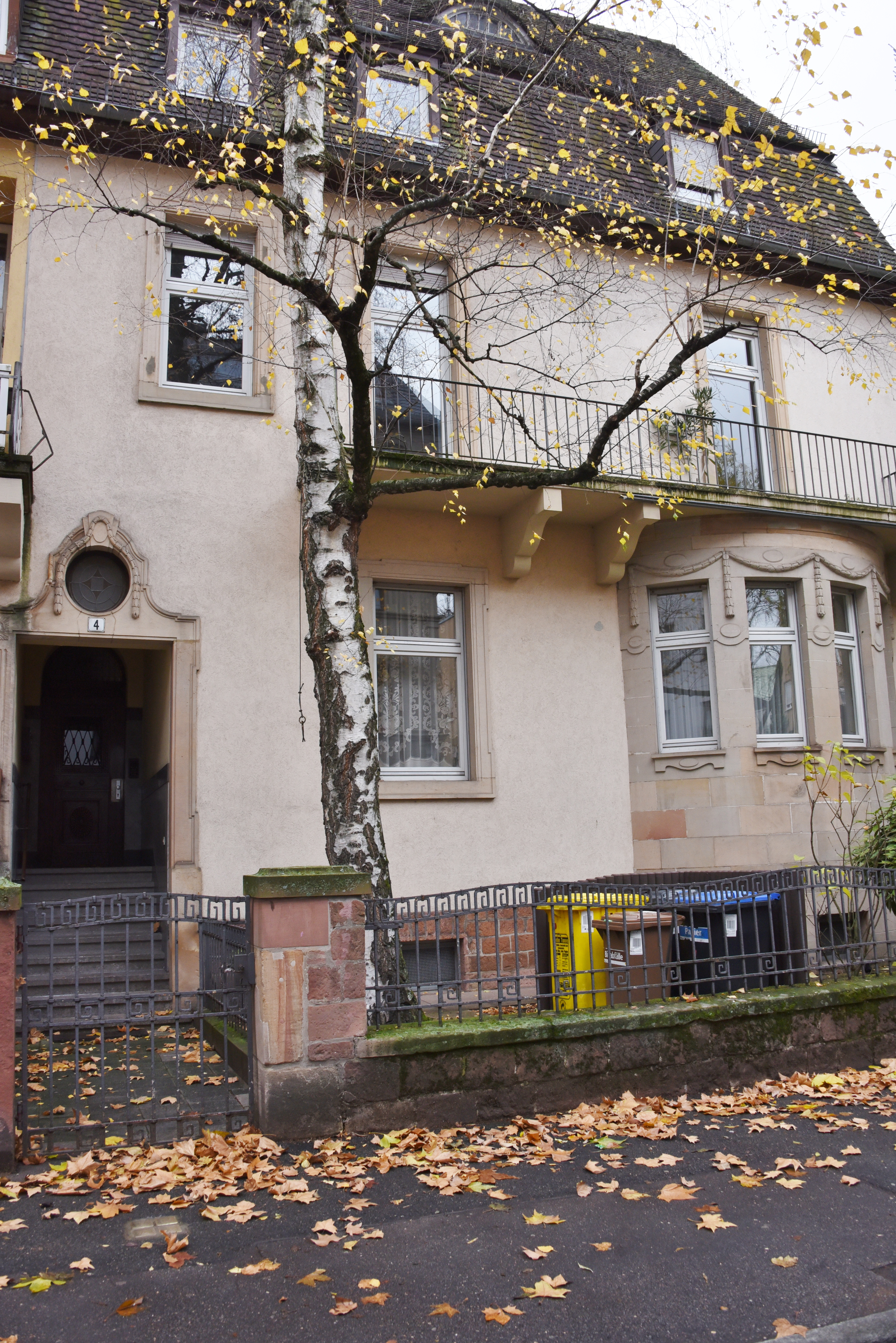 Villa in der Bluntschlistraße 4 in Heidelberg, ursprünglich im Besitz der Familie Engelberg, 1939 wurde sie arisiert, wurde es zu einem "Judenhaus", 1943 gelangte es in den Besitz der Stadt Heidelberg. Ein Restitutionsverfahren war erfolglos.